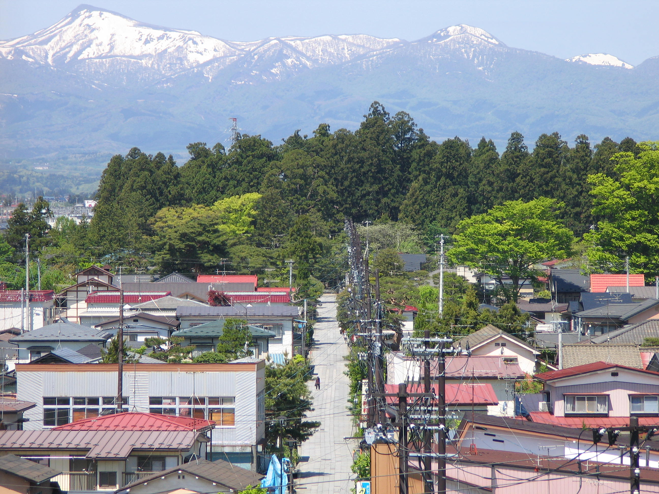 遠方から望む日高神社鎮守の森と参道である日高小路